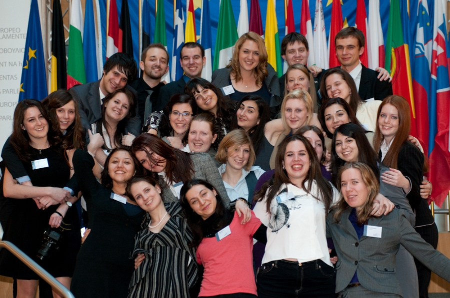 Organizatorzy MEU 2011